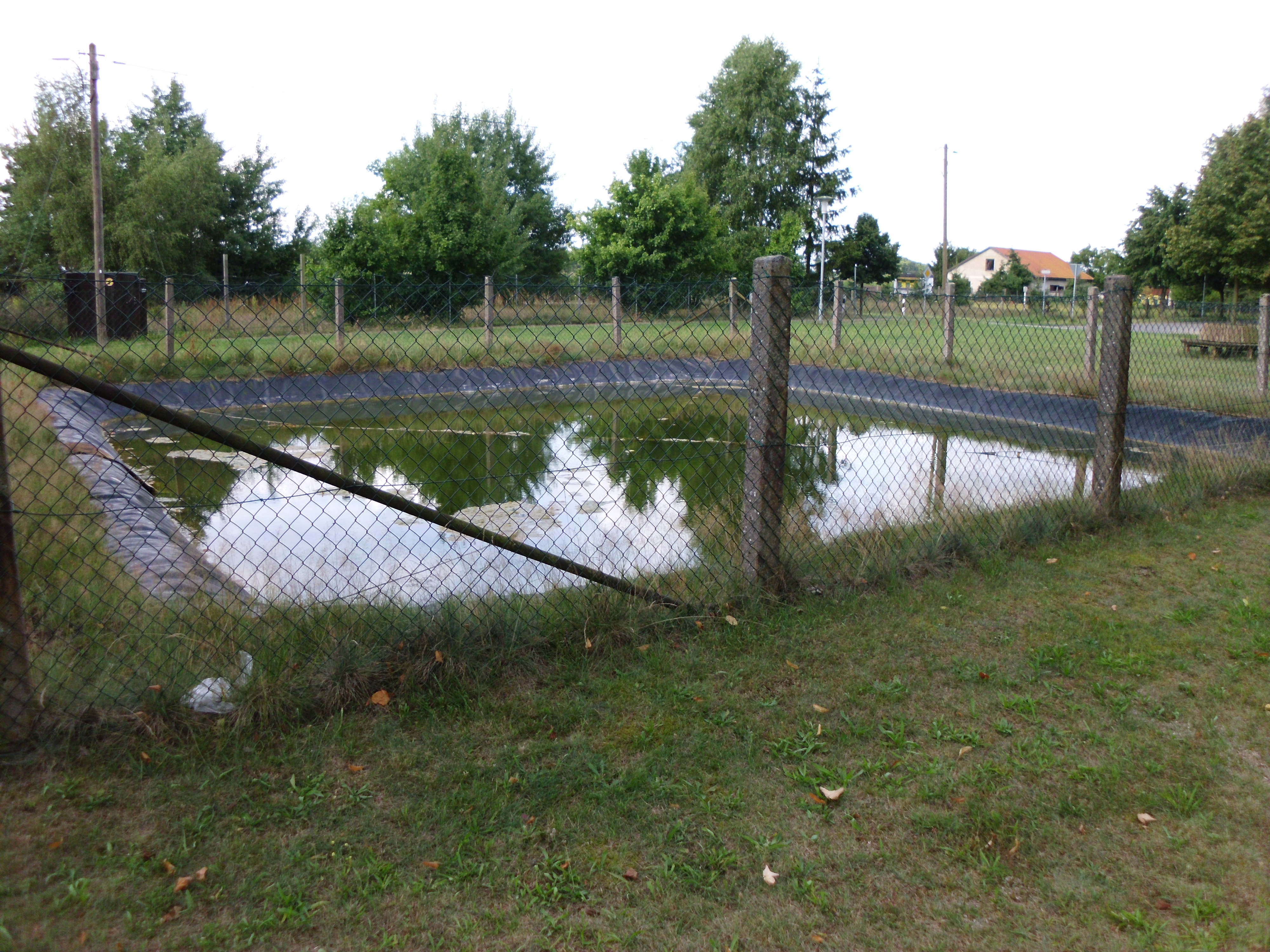 Löschwasserteich in Grube, Bad Wilsnack, Landkreis Prignitz